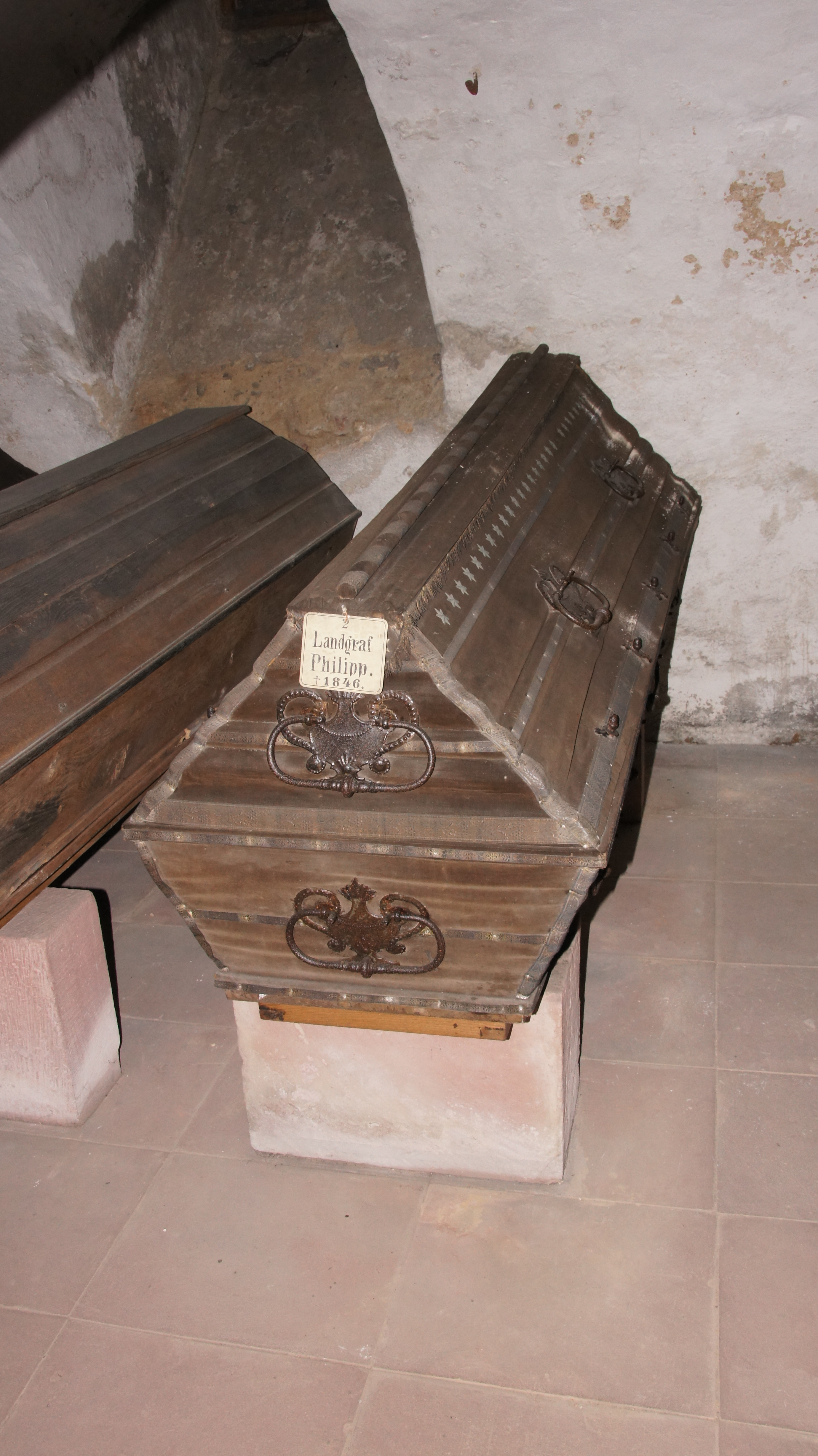 Bad Homburg vor der Höhe, Schloss, Gruft, Landgraf Philipp